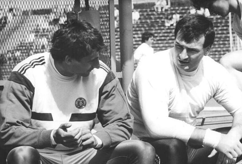 Ulf Timmermann, Christian Schenk im Gespräch ADN-ZB Sindermann -18.5.89 Rostock: Werfertag- An der Parade der DDR-Werferasse nahmen in der Bezirksstadt auch Kugelstoß-Weltrekordler und Olympiasieger Ulf Timmermann (r.) vom TSC Berlin und der Olympiasieger im Zehnkampf Christian Schenk vom SC Empor Rostock teil. Zum Saisonbeginn erreichten beide Athleten gute Weiten, Timmermann 21,35 Meter und Schenk 15,22 Meter.